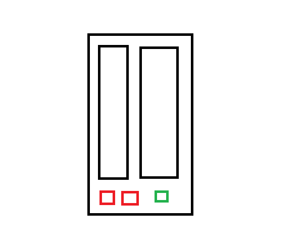 NAS